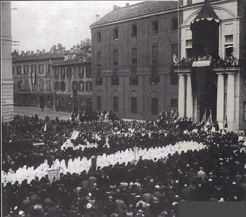 Inaugurazione sede di Largo Gemelli - Università Cattolica del Sacro Cuore